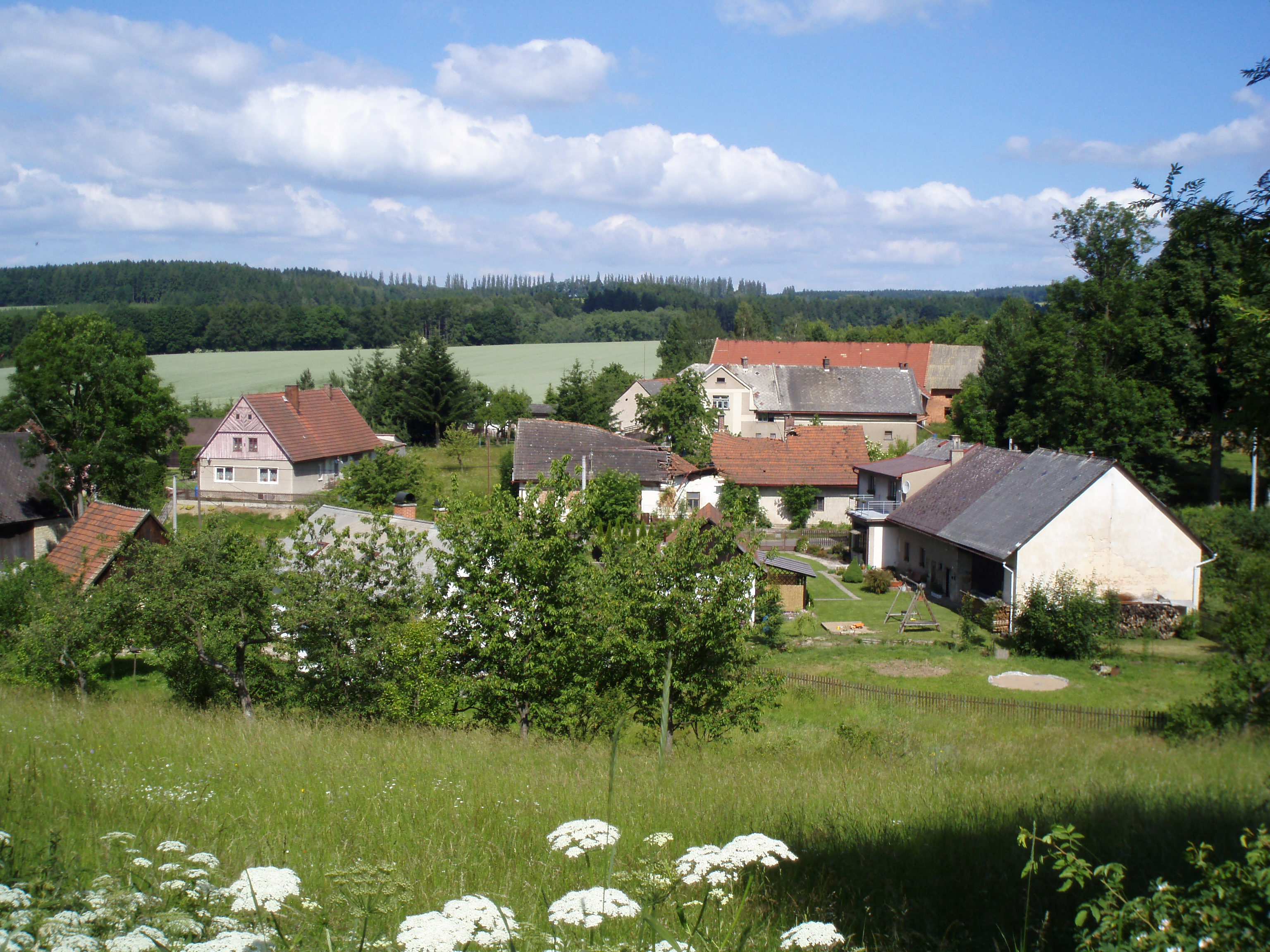 Pohled na Mezilečí